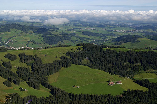 Blick vom Kronberg (Urnäsch, Hundwil)